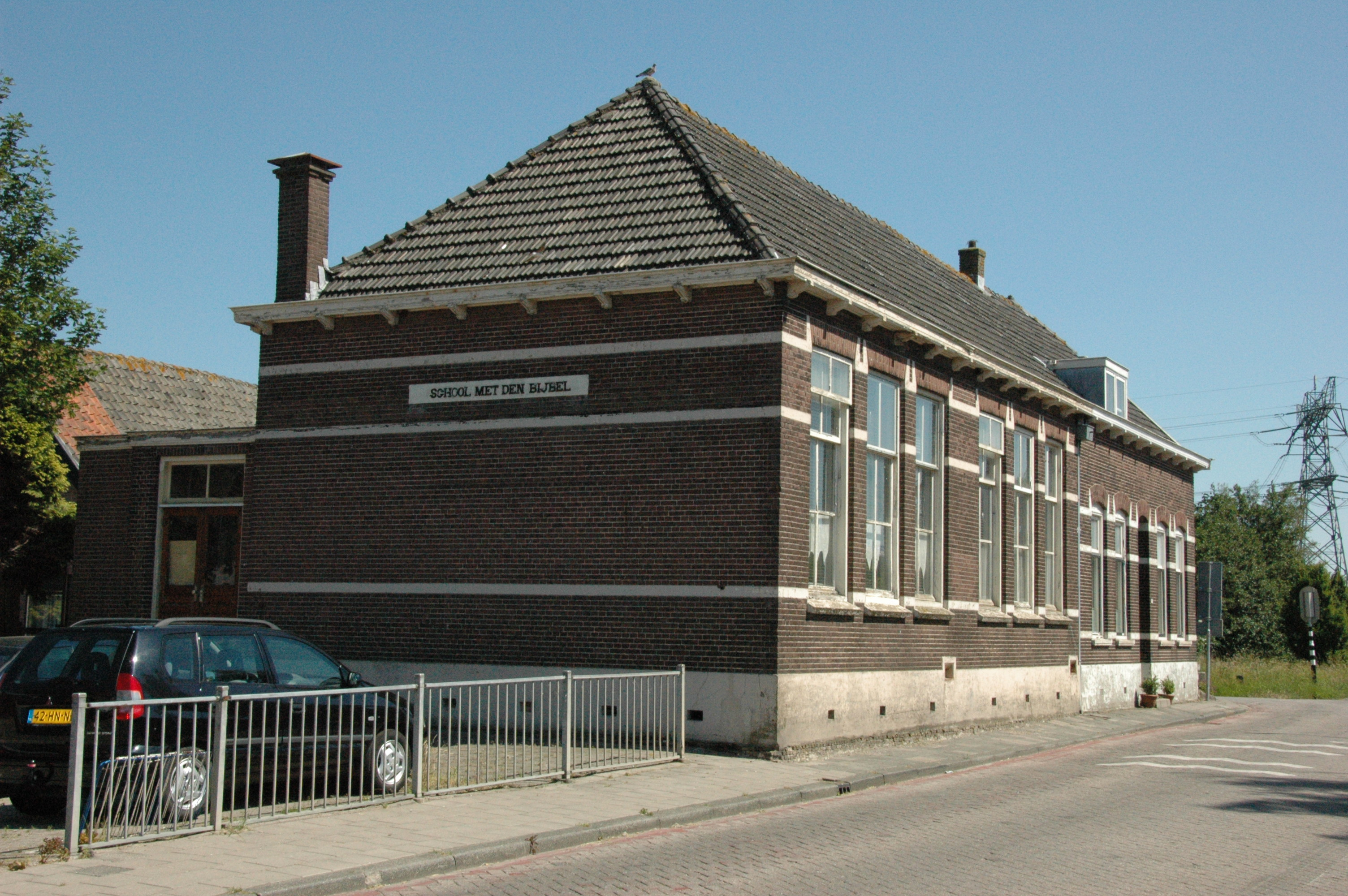 Omschrijving